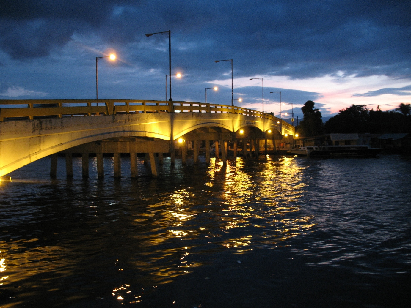 El Malecon en Puerto Cortes, Honduras. Photo by : Dennis Garcia.